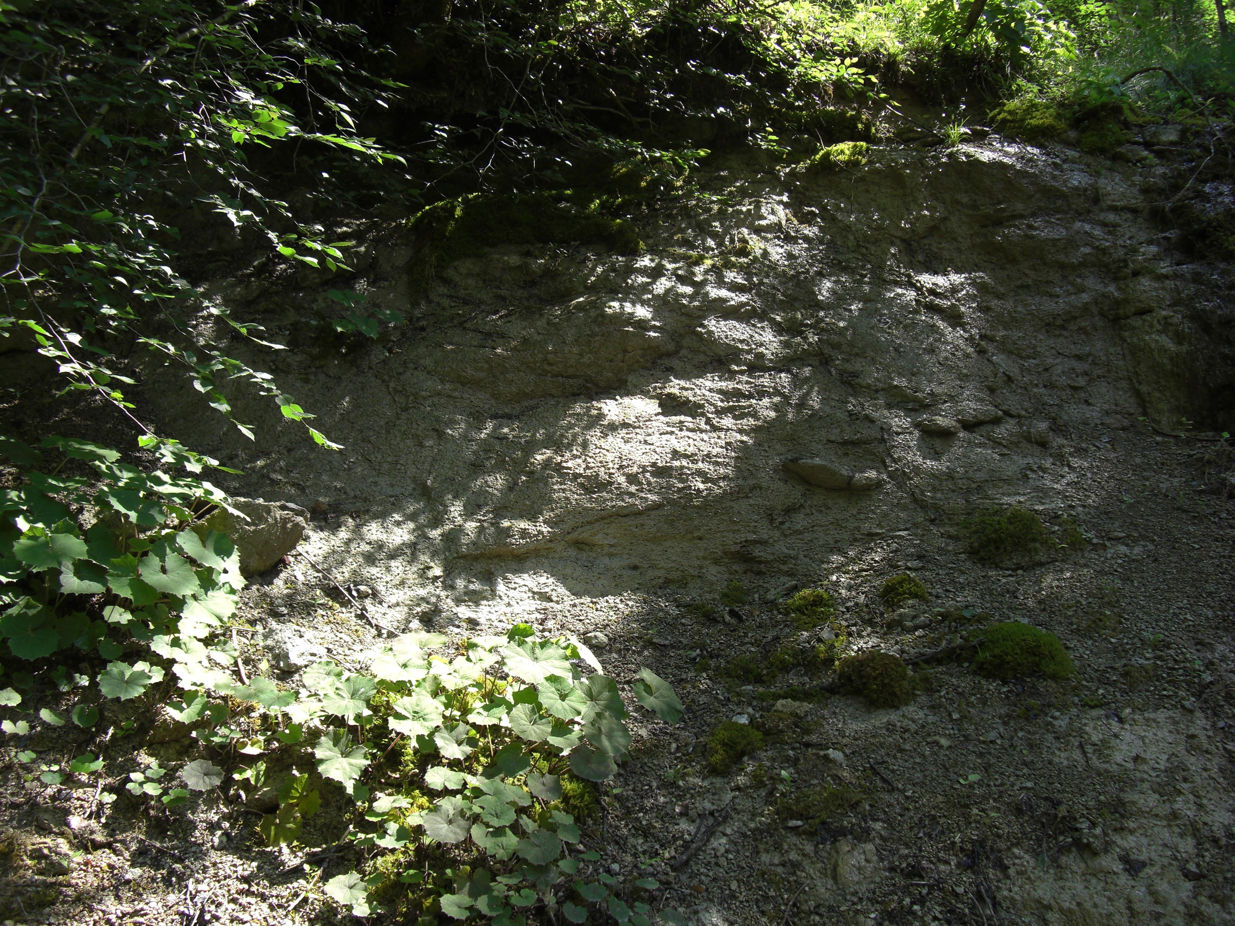 Knollenbrekzie in der Glasenbachklamm